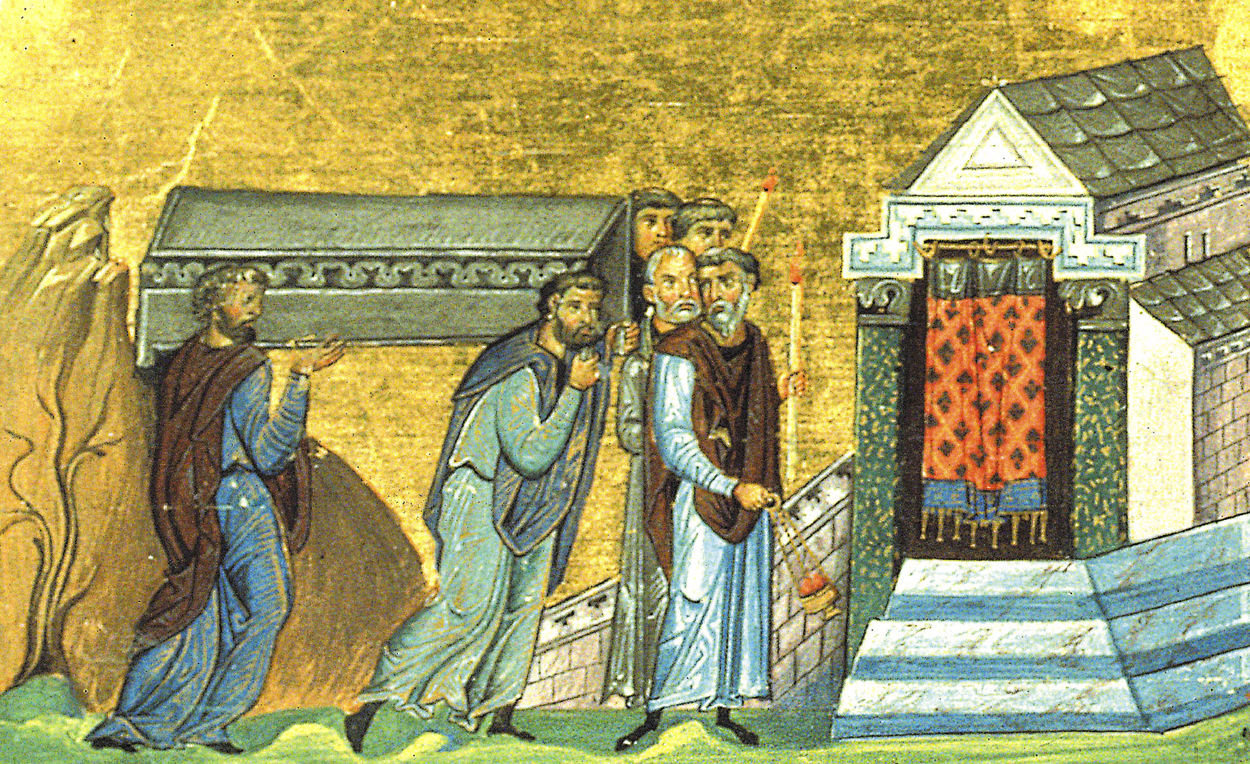 Преподобномученик Анастасий Персиянин Константинополь. 985 г. Миниатюра Минология Василия II. Ватиканская библиотека. Рим.